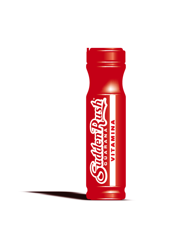 SuddenRush Guarana, Donovan Gregory